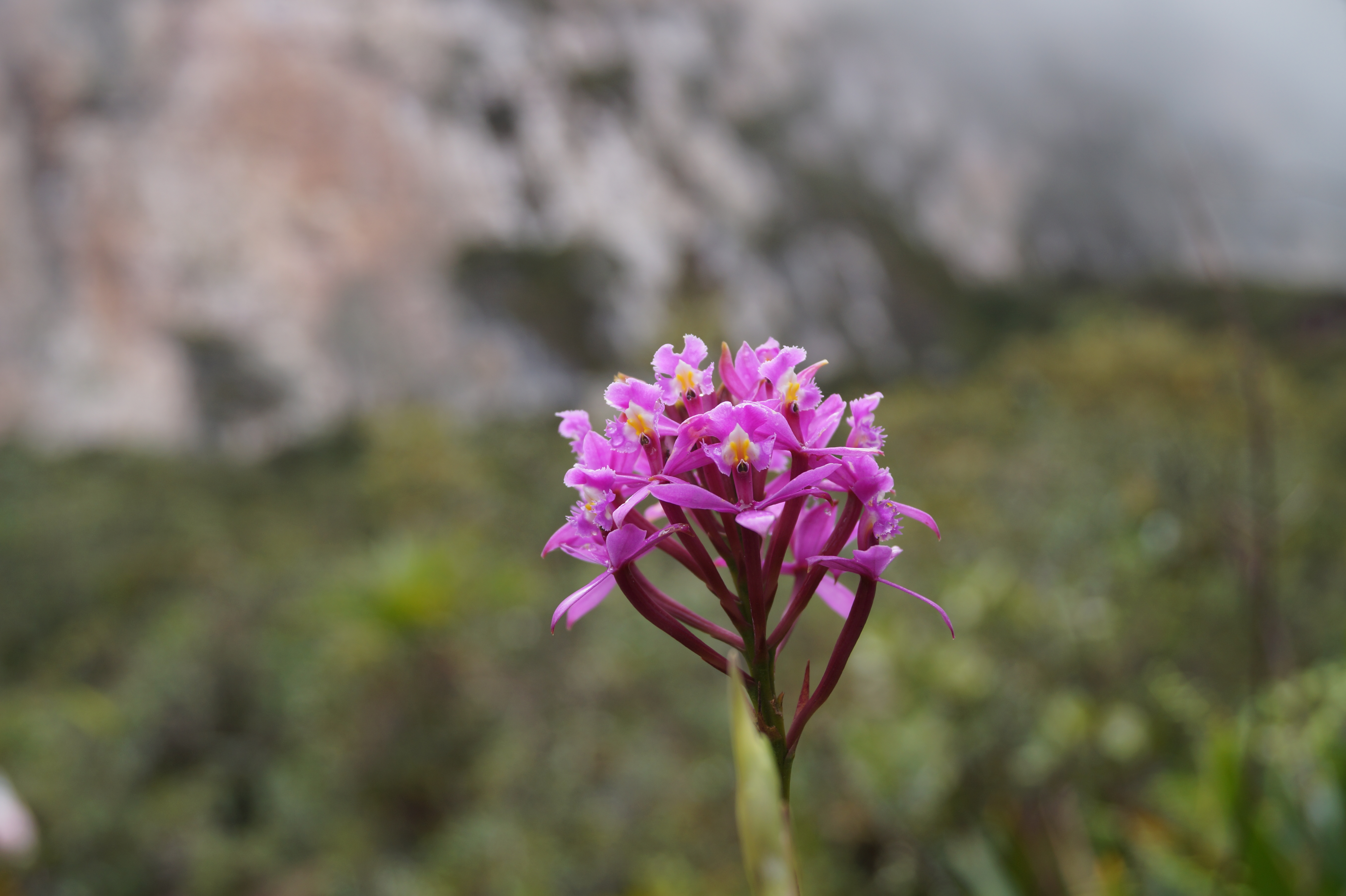 En la ruta al tepuy Roraima, se encontro esta planta, el fondo es el mismo Tepuy. Semana Santa 2014